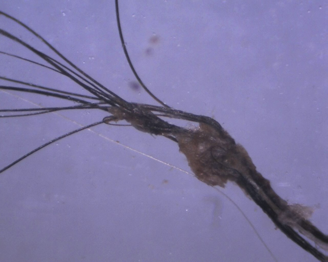 Mikroskopisches Bild einer Sebadenitis bei einem 7jährigen Hovawartrüden (Geo von der Tannenmühle). Zu sehen sind die ausgeprägten Keratin-Manschetten an den ausgezupften Haaren.